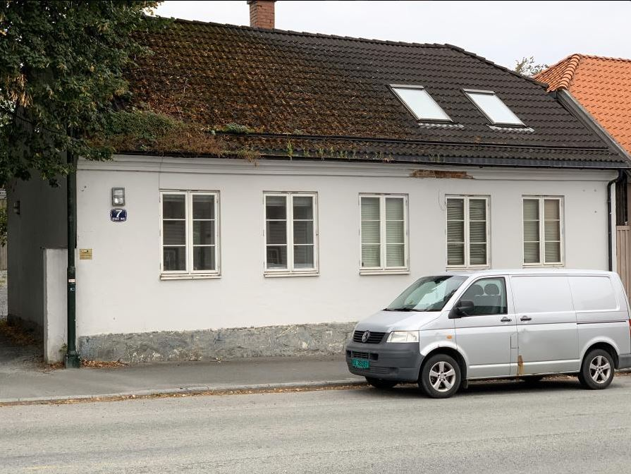 Foto av Klostergata 7/7A (Moss)